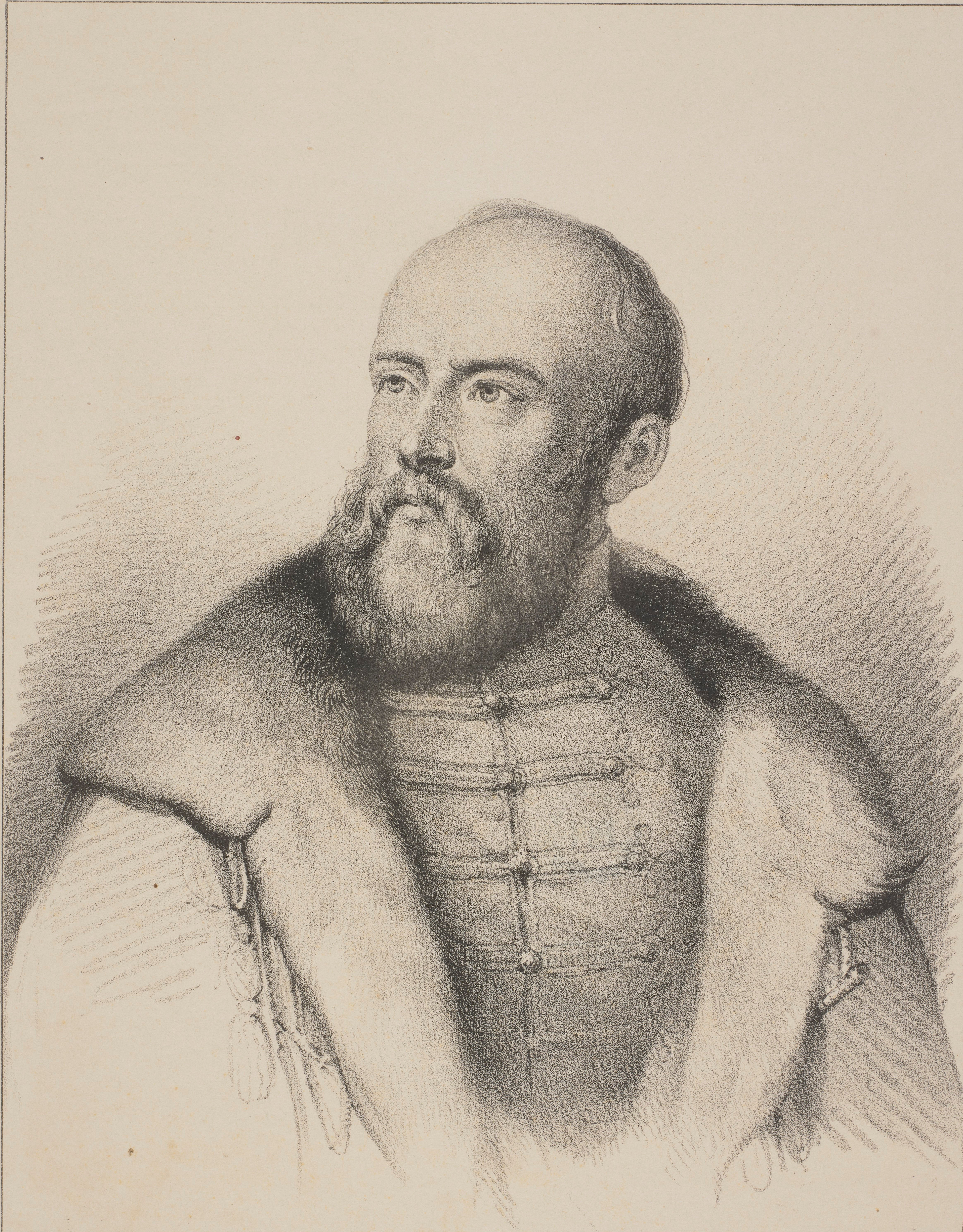 Władysław Wężyk